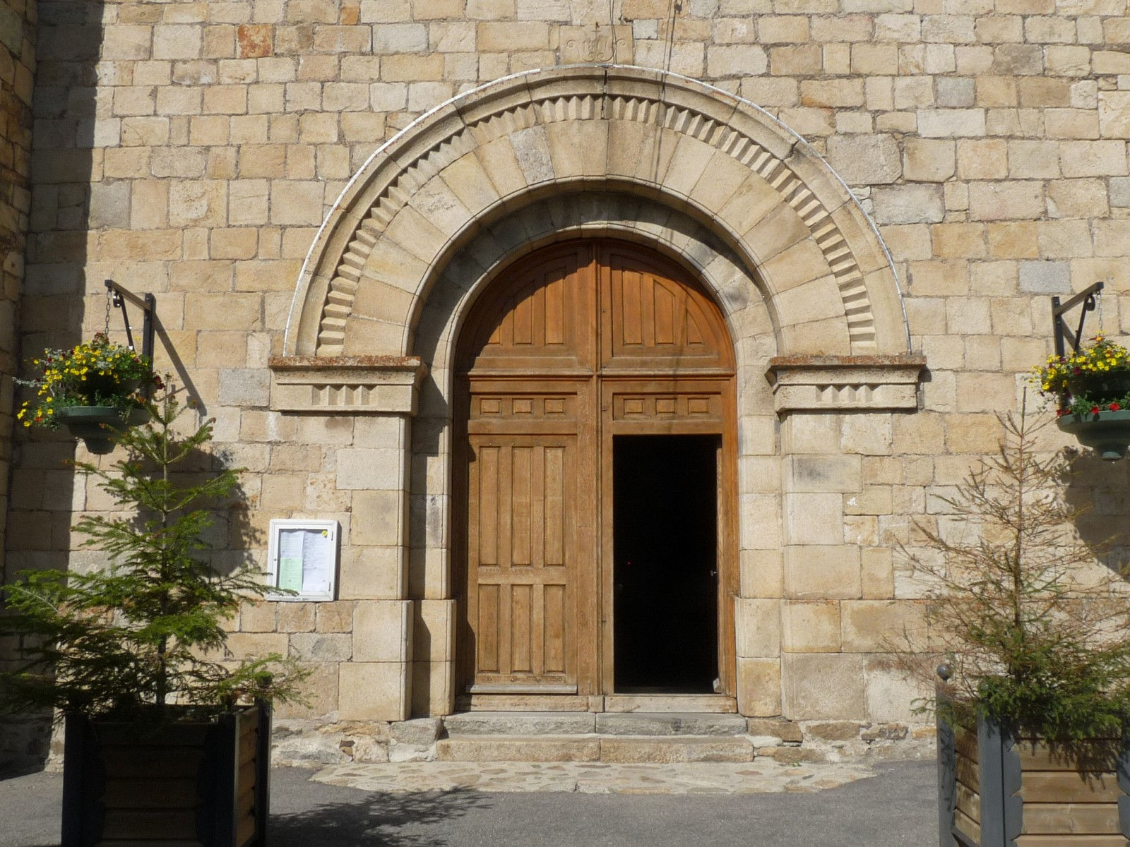 Eglise des Angles, Pyrénées-Orientales, France